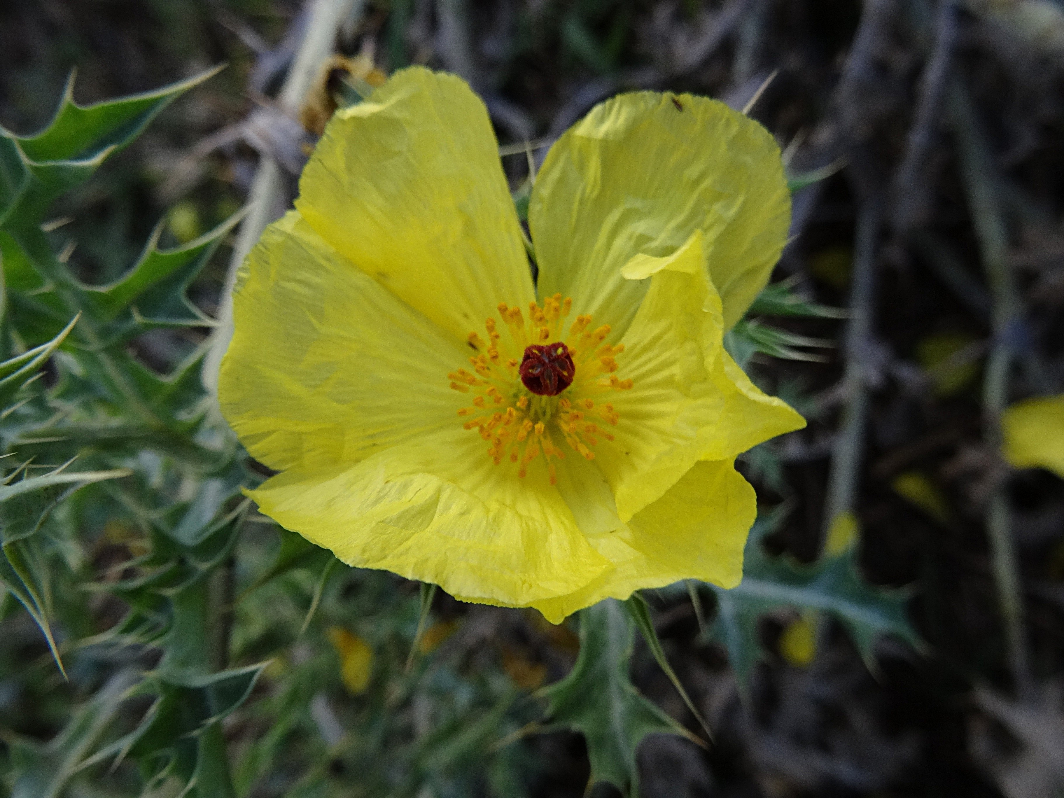 Mexikanischer Stachelmohn, Argemone mexicana, gelber Distelmohn, Blüte